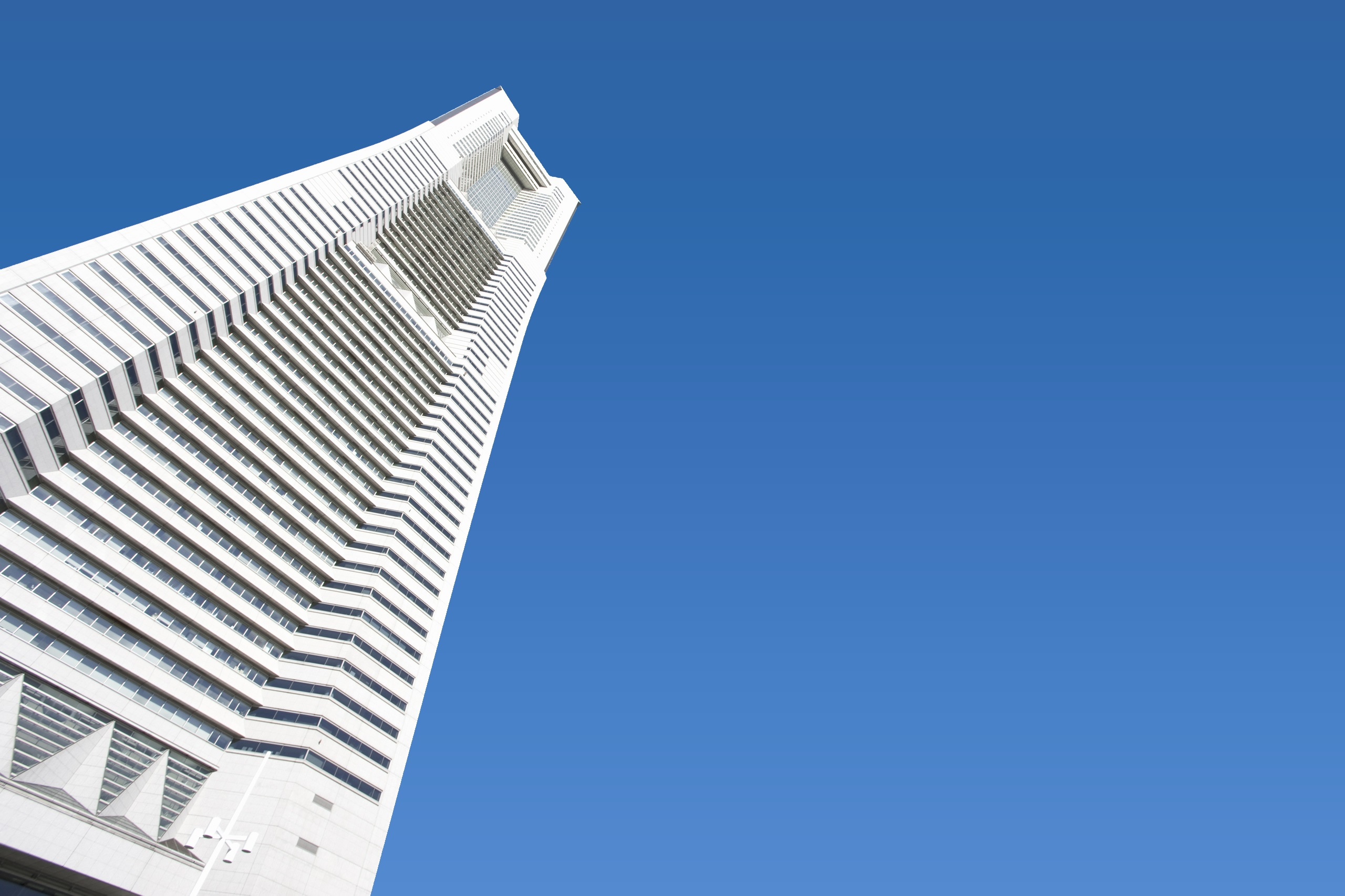 ADI.G横浜本社